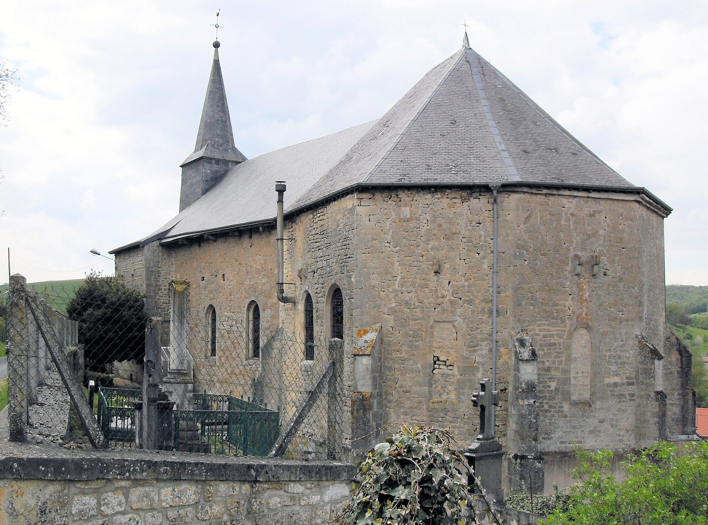 L'église Saint-Rémi à Yoncq